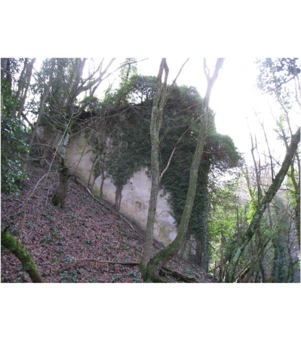 Culée EST